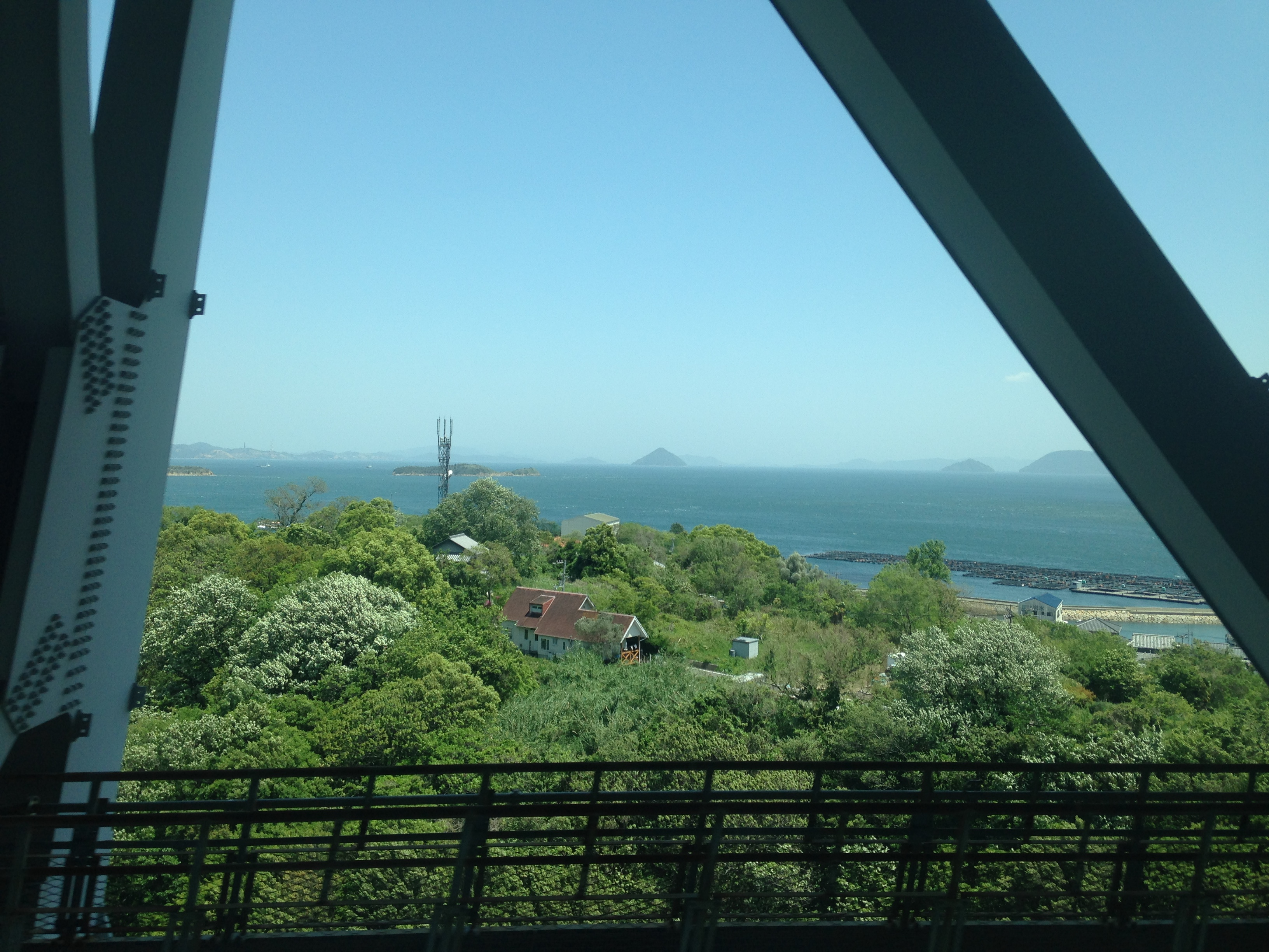 岩黒島付近を通過する瀬戸大橋線の列車内より望む景色